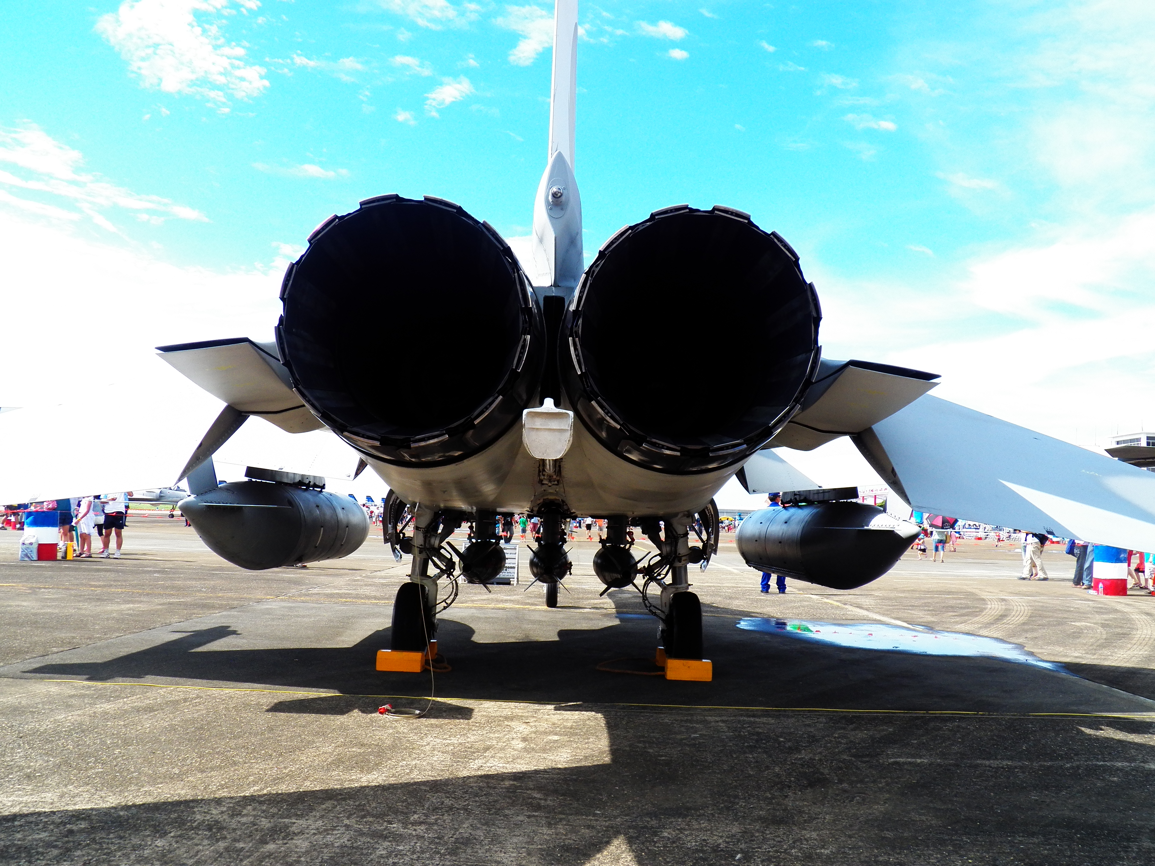 後下方所見455聯隊F-CK-1A 1462機尾噴嘴與機腹掛架武裝，攝於2012年空軍嘉義基地營區開放活動。